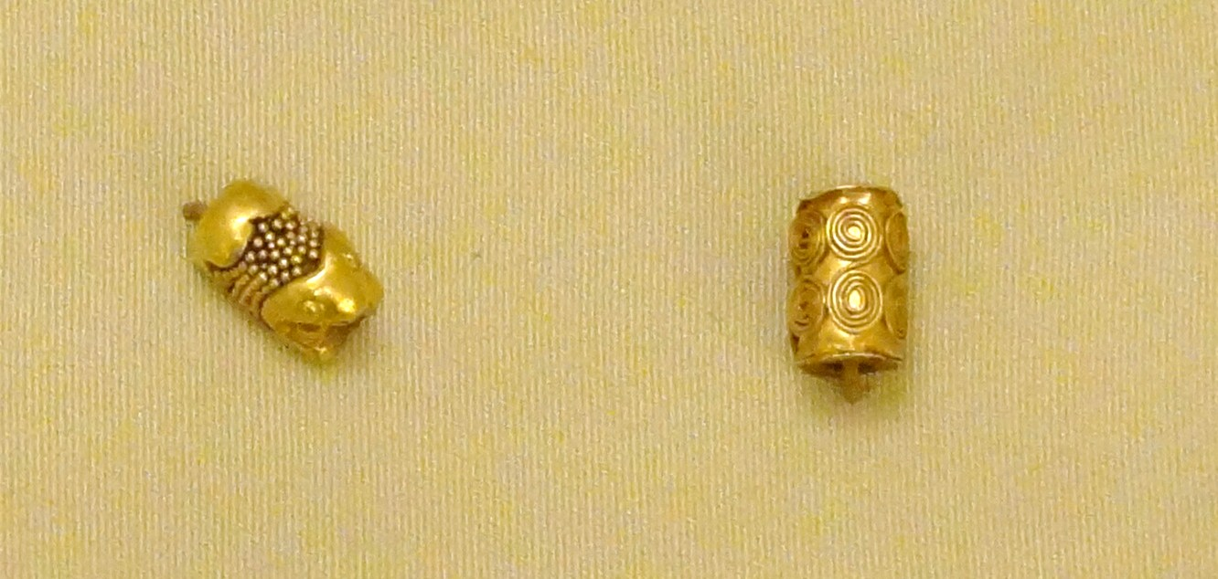 Minoische Goldarbeiten in Form eines Löwen oder Frosch und eines Zylinders mit Spiraldekor (Vor-/Altpalastzeit, 2000–1800 v. Chr.) aus Koumasa und Kalathiana (Messara), ausgestellt im Archäologischen Museum Iraklio, Kreta, Griechenland